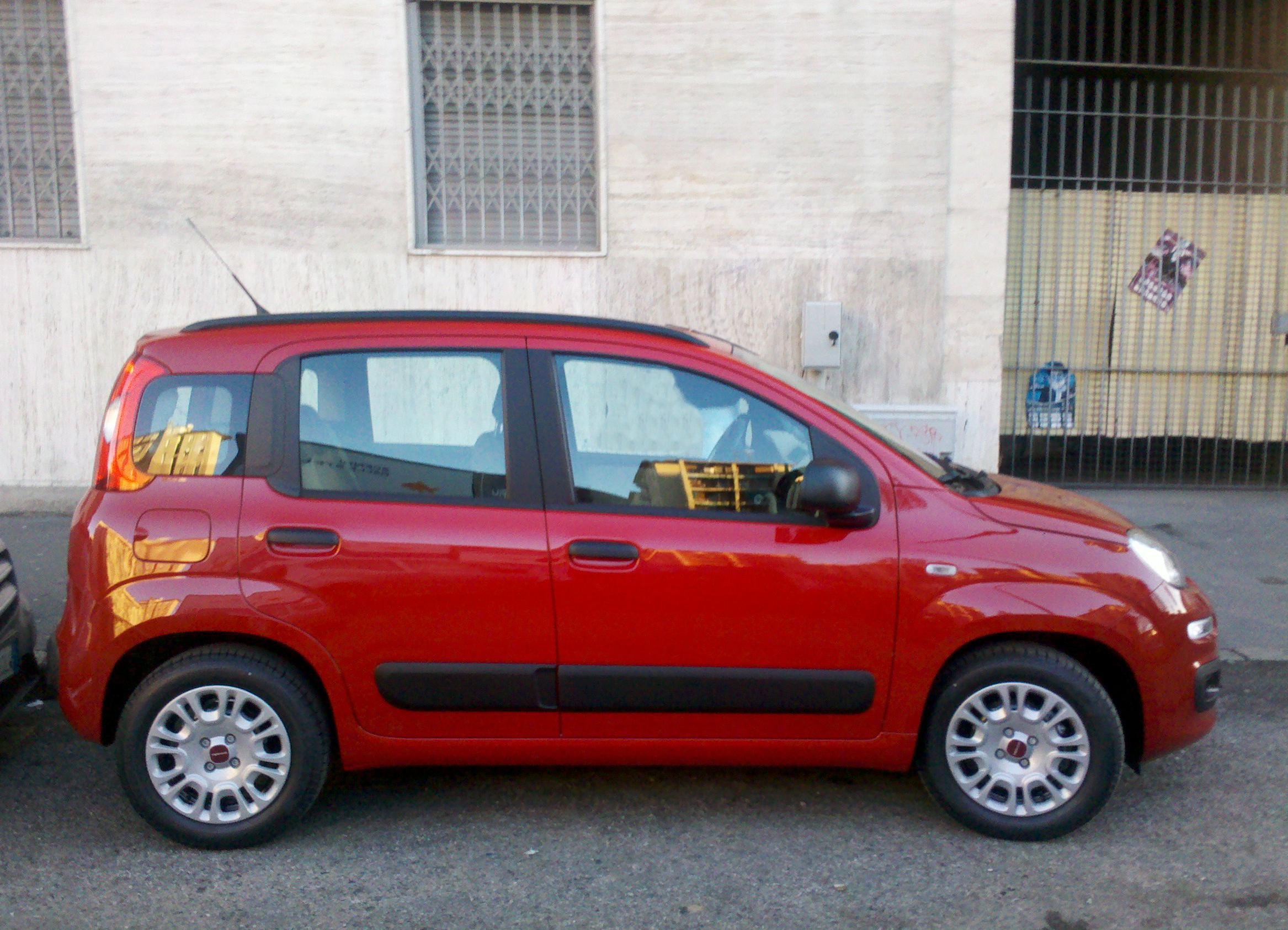 Una Fiat Panda 2012 a Milano